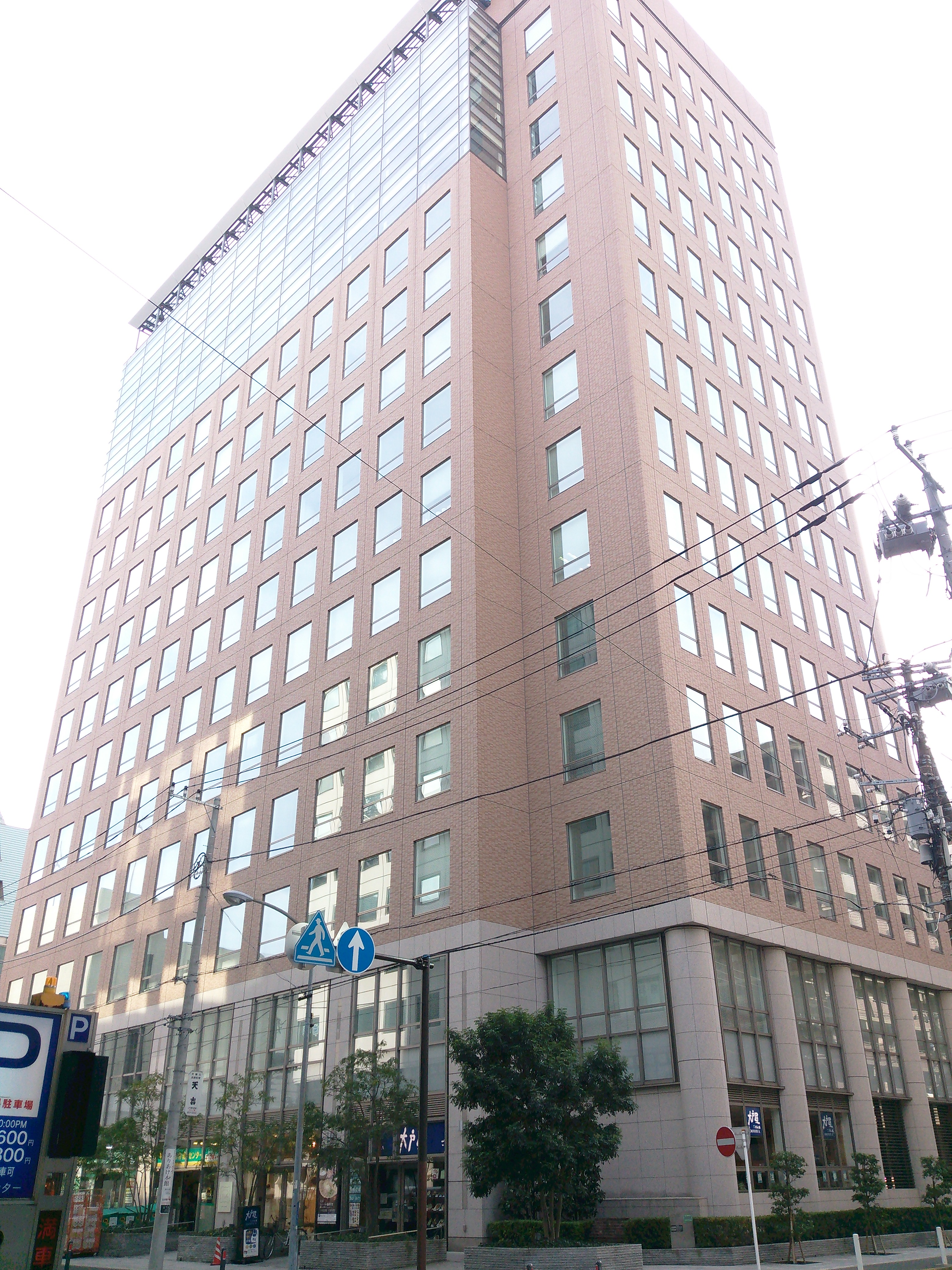 横浜市中区山下町、日土地山下町ビル。横浜市水道局などが入居。